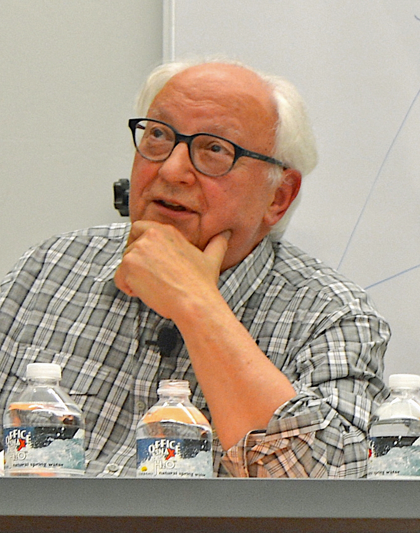 Etienne Balibar 2014 in Berkeley bei einer Podiumsveranstaltung ( zusammen u.a. mit Judith Butler).